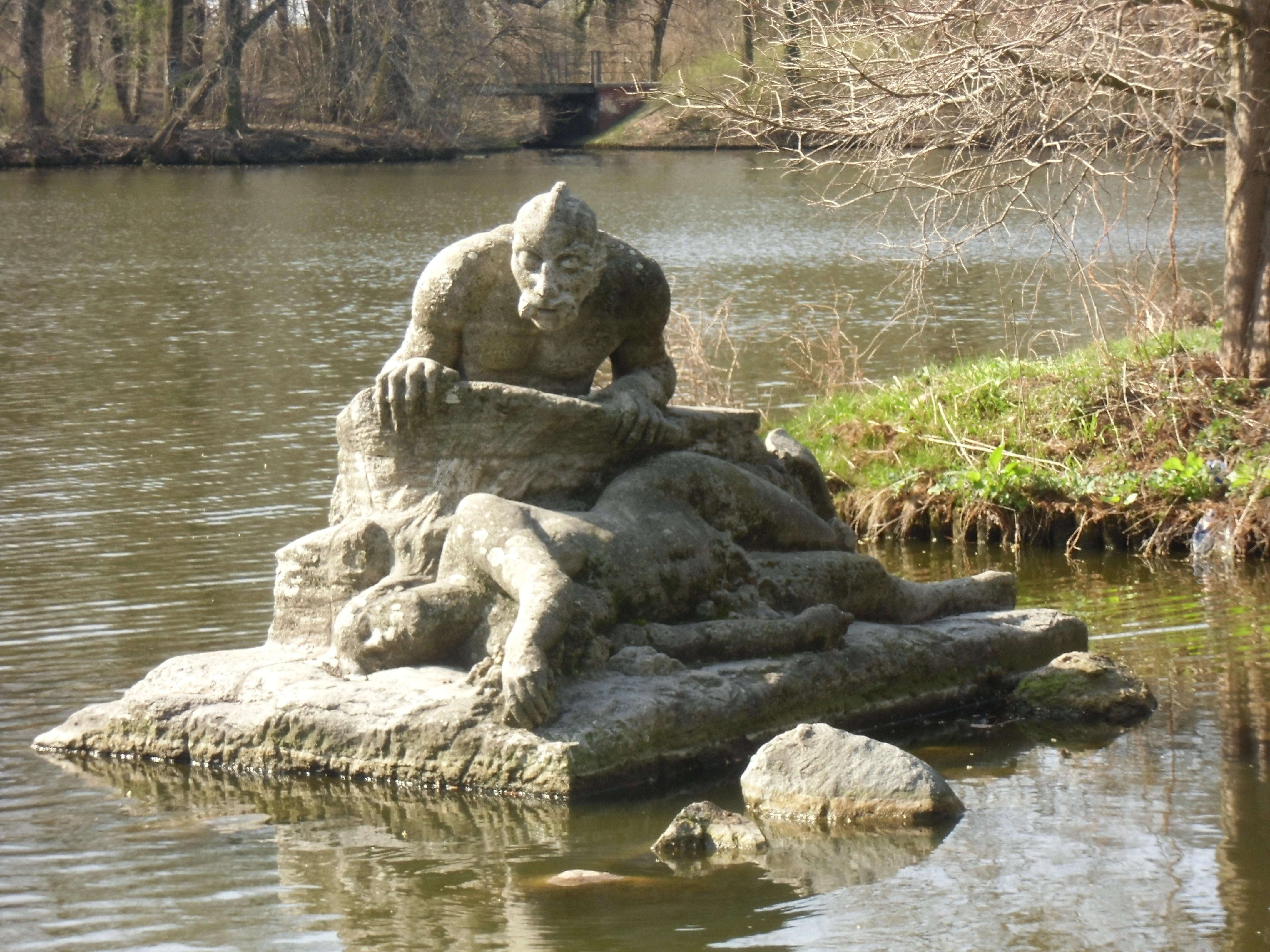 Skulptur "Meeresgrund" von Otto Petri 1907 aus Muschelkalk geschaffen, befindet sich in einer Bucht des Karpfenteiches im Gartendenkmal Treptower Park